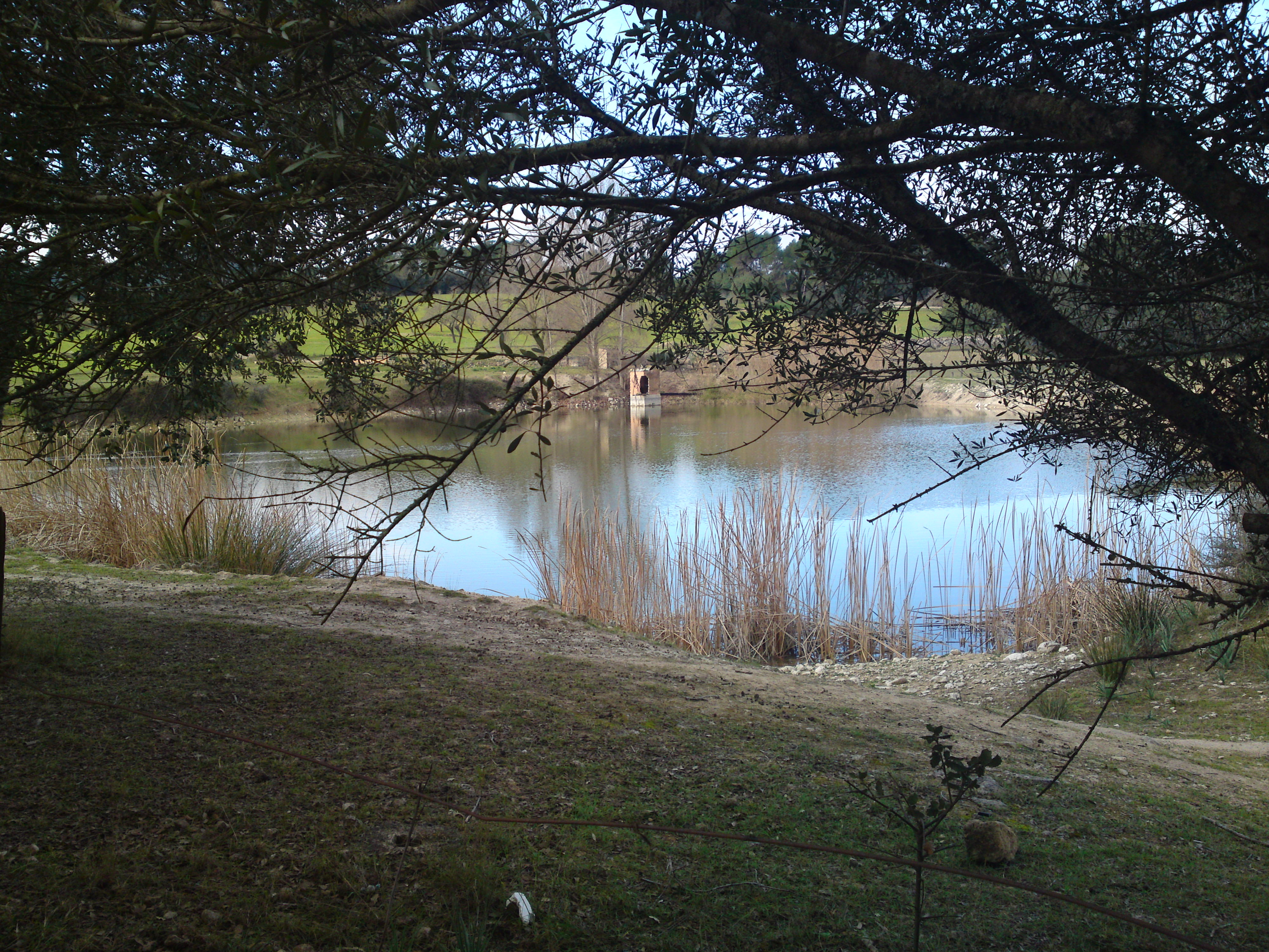 Bassa d'aigua i font de Son Trobat (Algaida, Mallorca) des de la carretera MA-5017 que uneix Randa i Montuïri